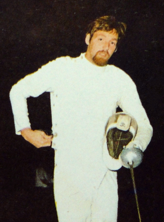 MUNCHEN 72-Figurina-Stickers-Panini-N° 35-EDLING recuperata